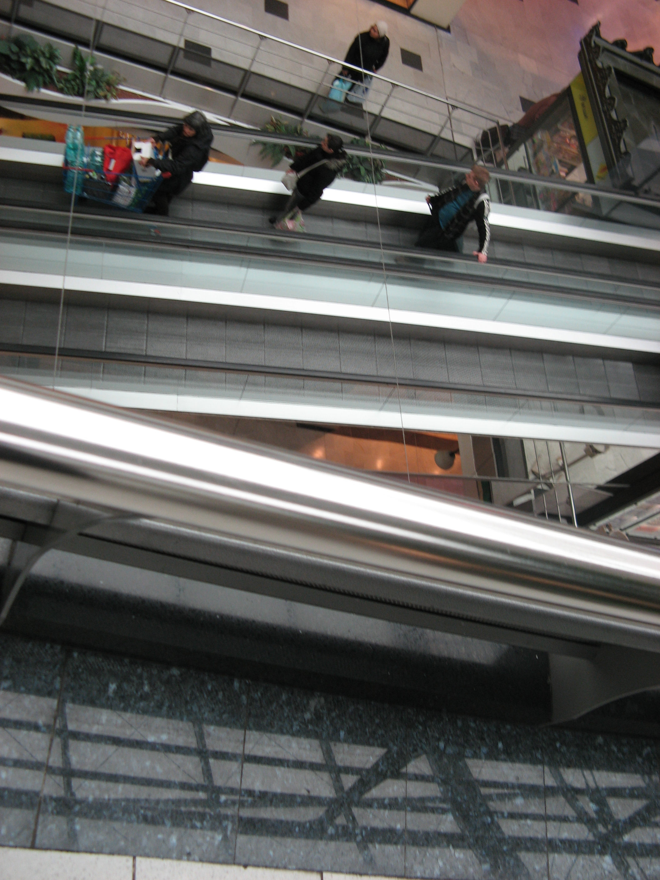 Les escalators du centre commercial régional de Créteil